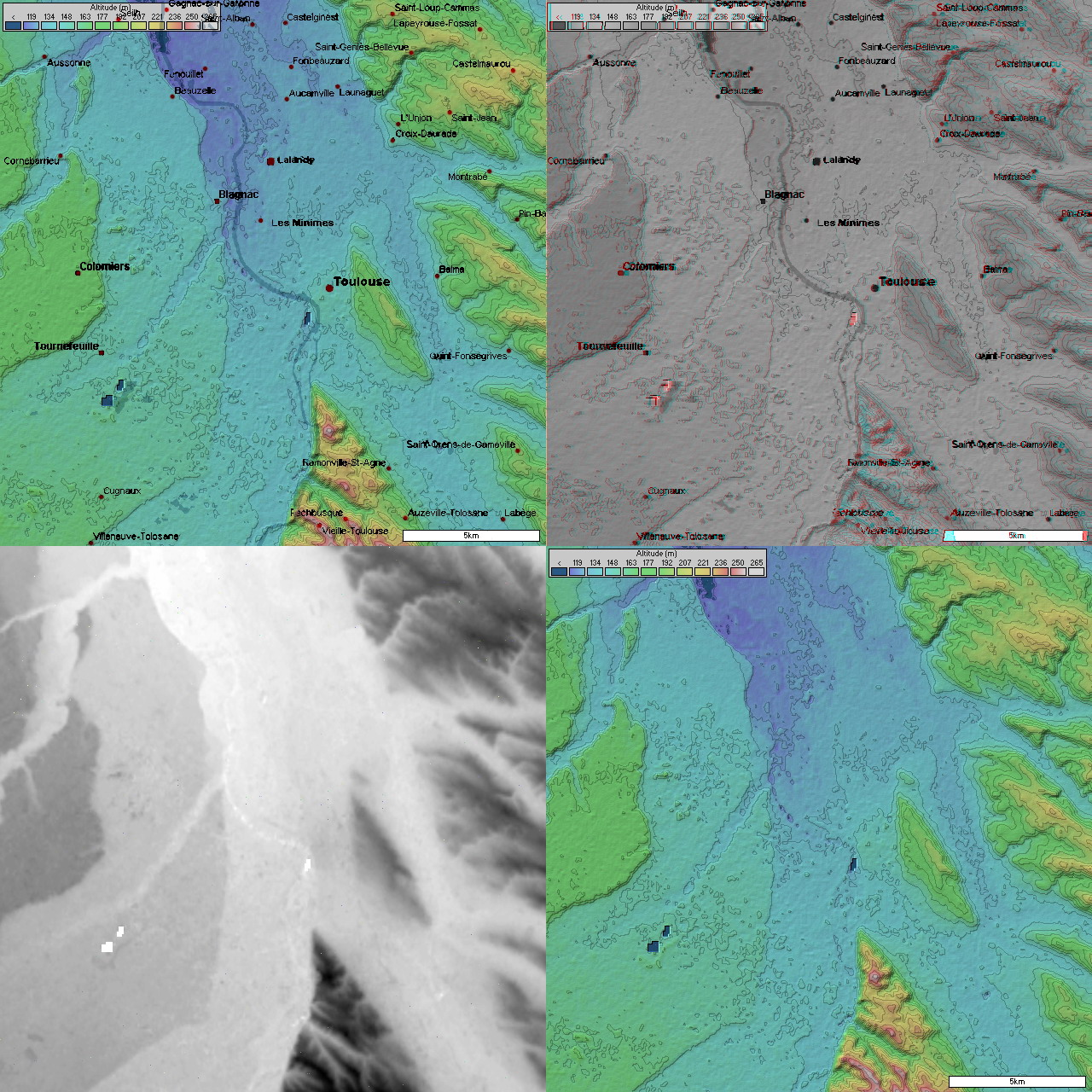 Topographie de Toulouse 4 images topographiques (20 km de côté) de Toulouse, prises par la mission SRTM. Image topographique + position des villes image topographique en relief + position des villes image topographique en niveau de gris (utile pour displacement map dans les logiciel 3D) Image topographique sans les villes Générée par le logiciel Radiomobile à partir des données domaine public de la mission SRTM de la NASA.